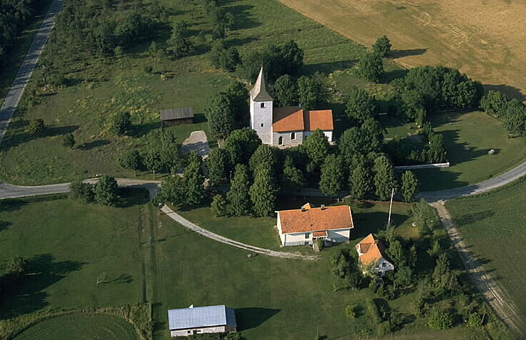 Motiv: Viklau kyrka Nyckelord: Flygbilder, Riksintressen Kategori: KyrkomiljöViklau kyrka